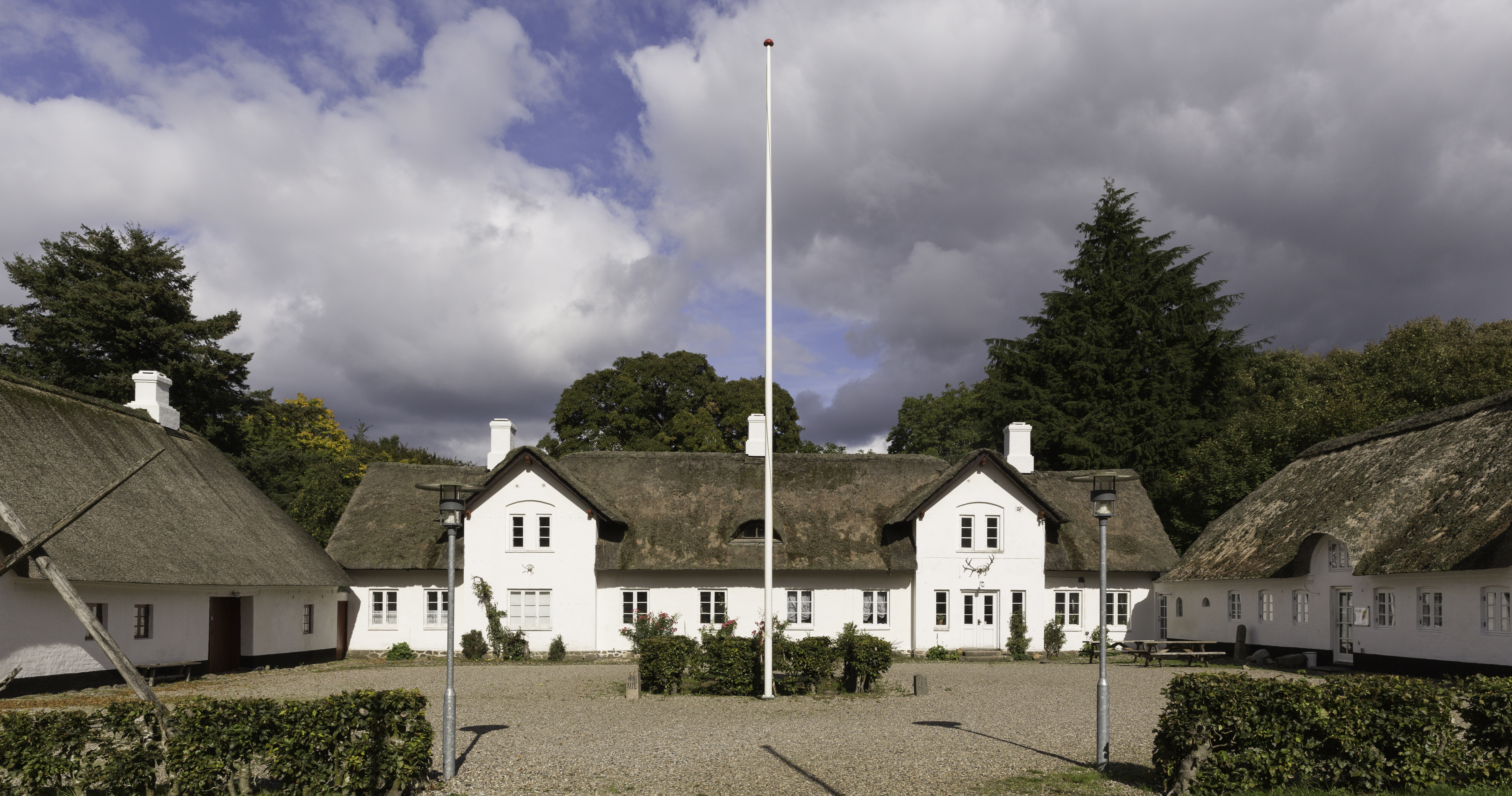 Skovmuseum i Palsgård Skov